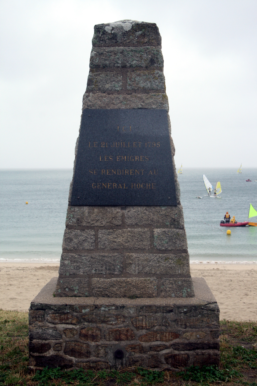 Monument commémorant la rédition des émigrés au maréchal Hoche